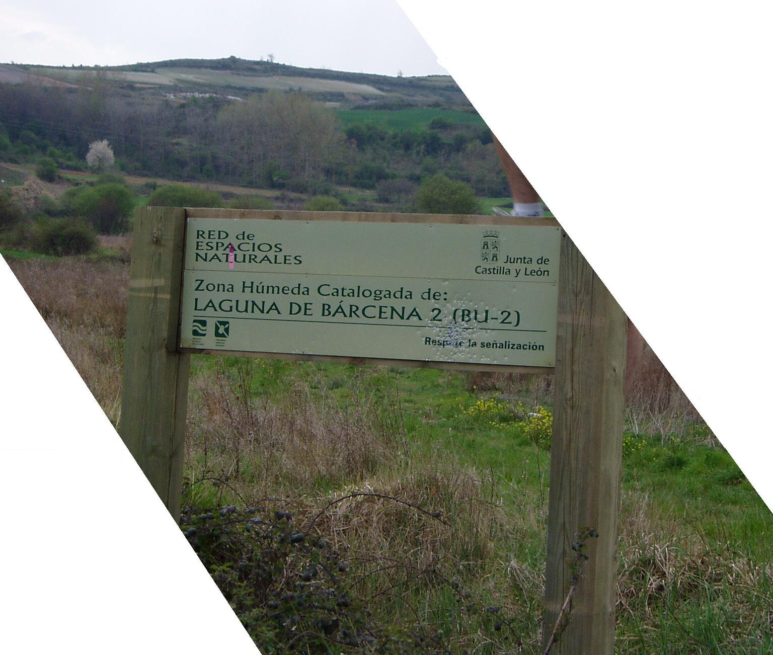 Lake